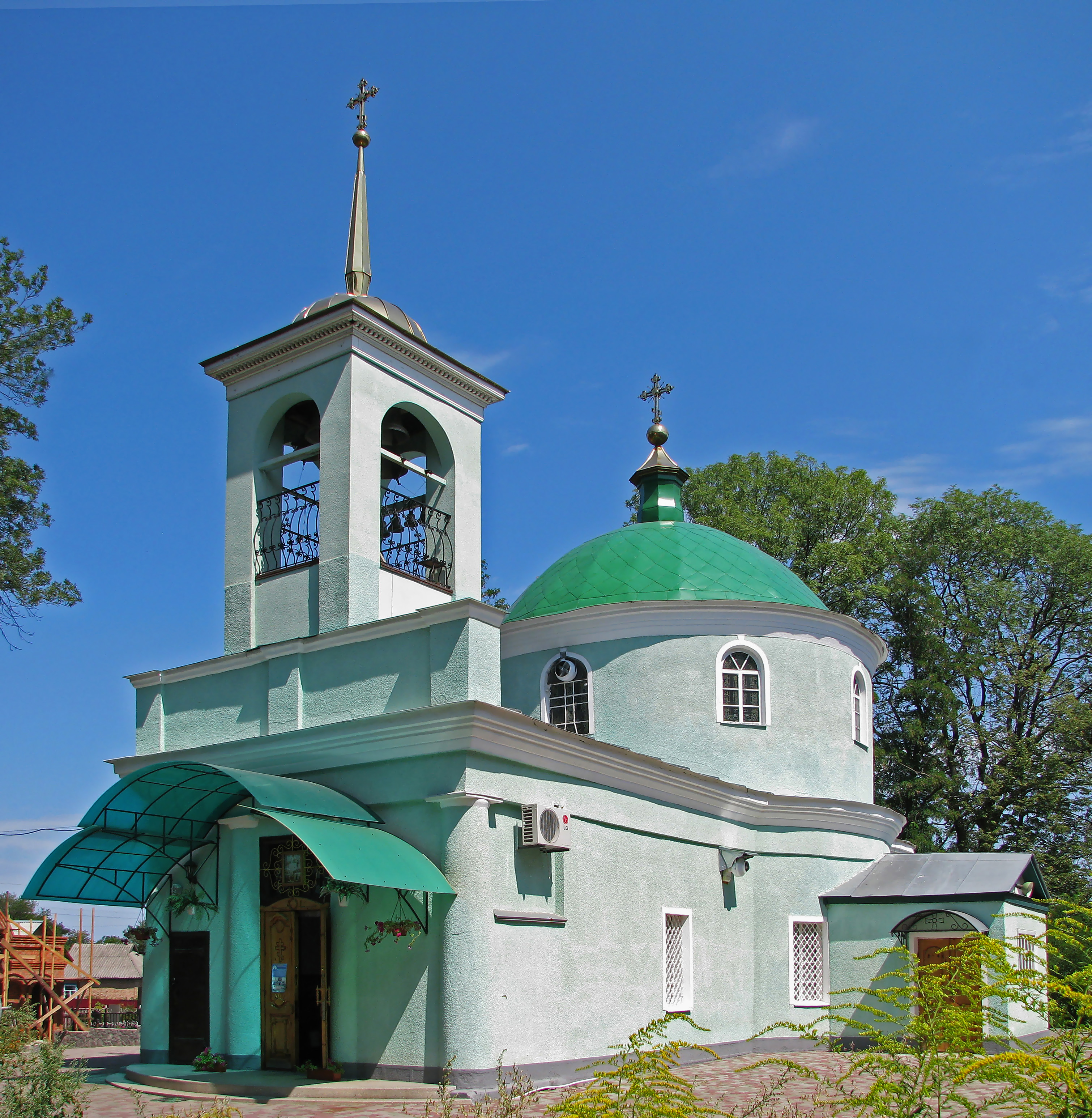 Всехсвятская церковь в городе Гадяч Полтавской области